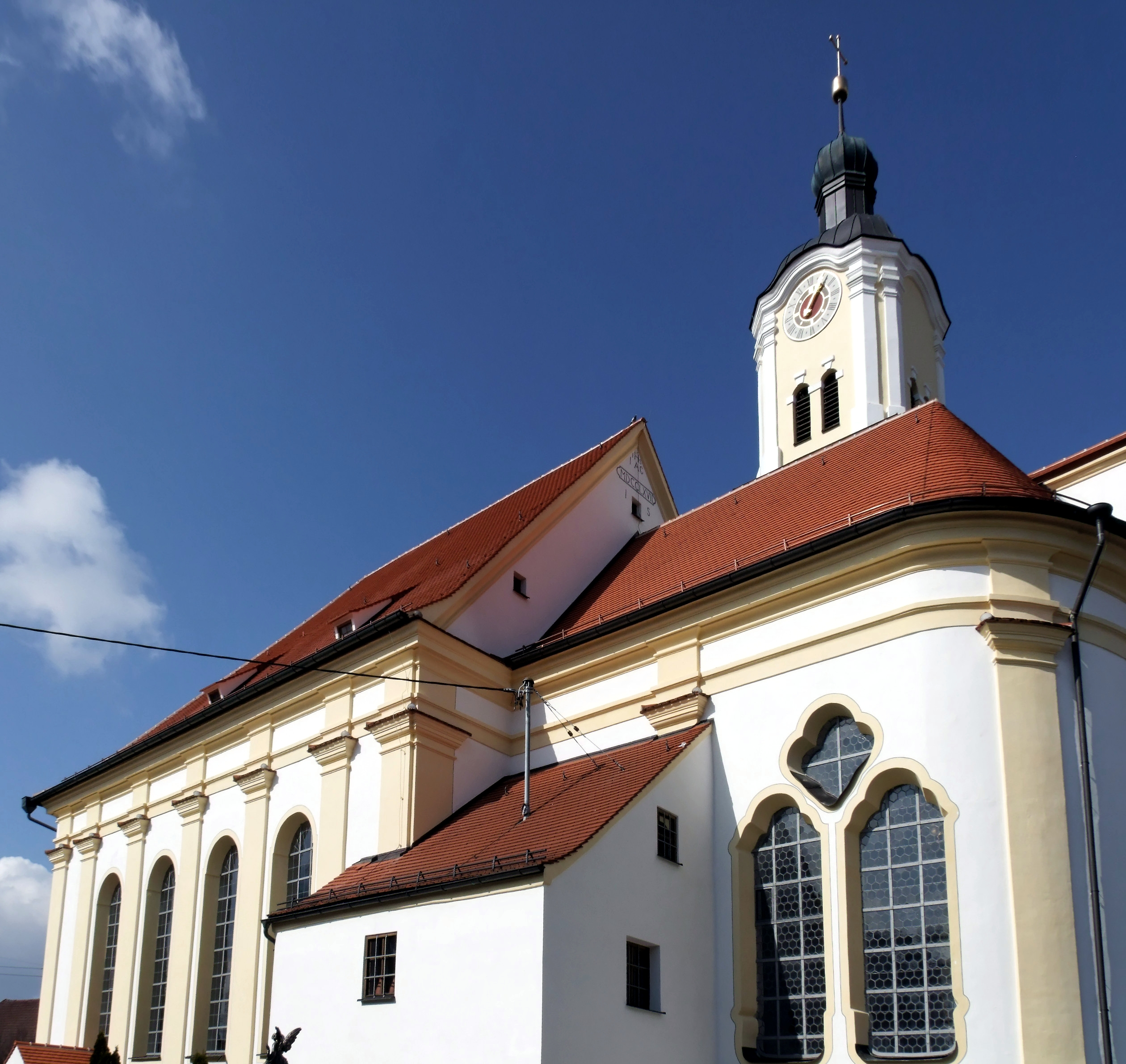 St. Magnus in Unterrammingen in Oberschwaben